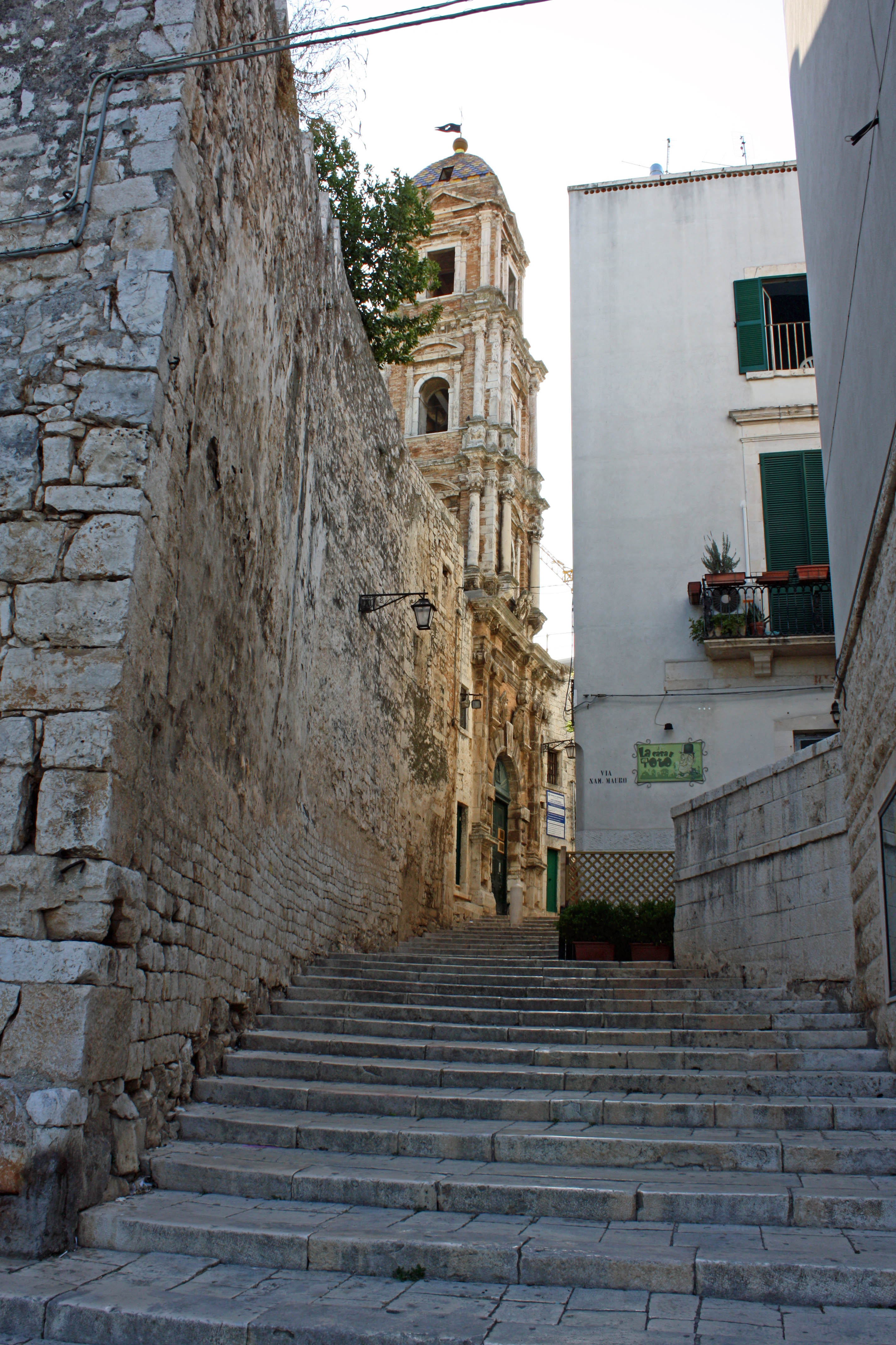 Conversano: mura megalitiche e campanile di San Benedetto